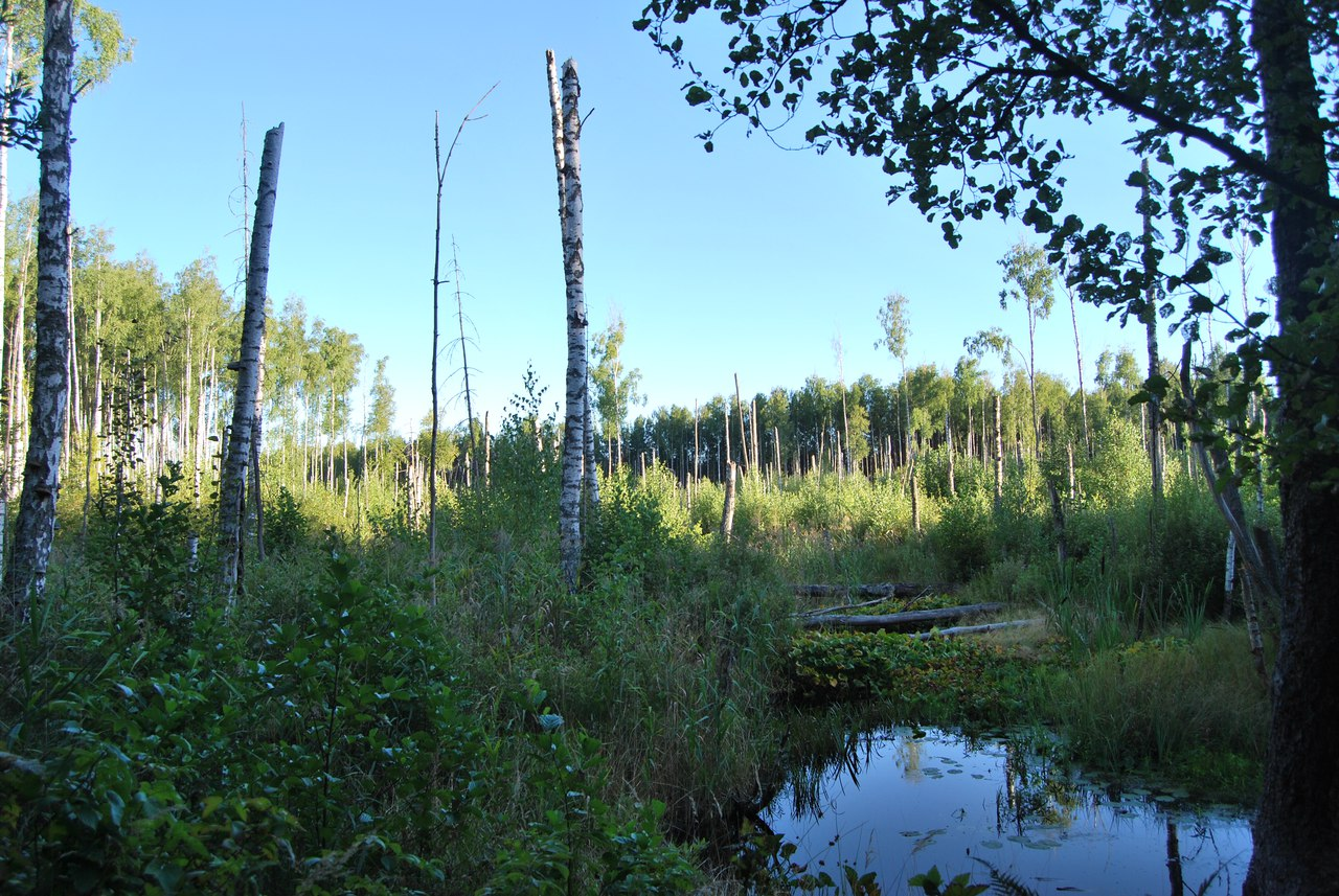 Заболоченный участок реки Цаплинка недалеко от деревни Александрово